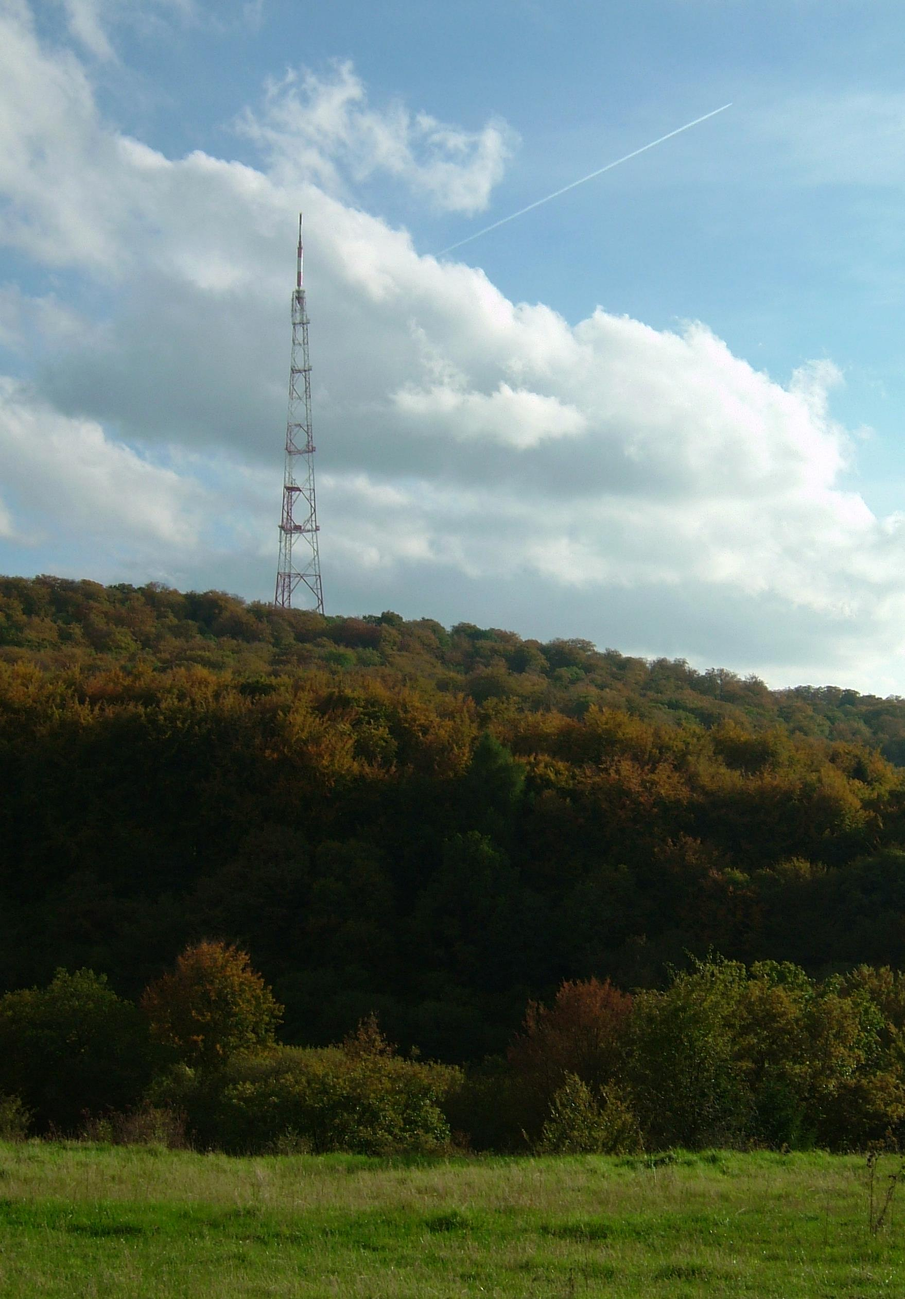 Ginzebierg zu Diddeleng